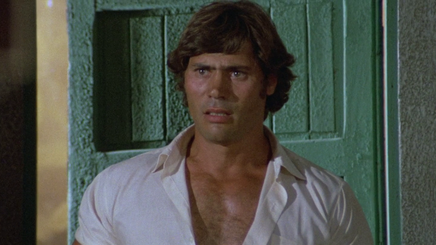 scena dal film Quelli che contano